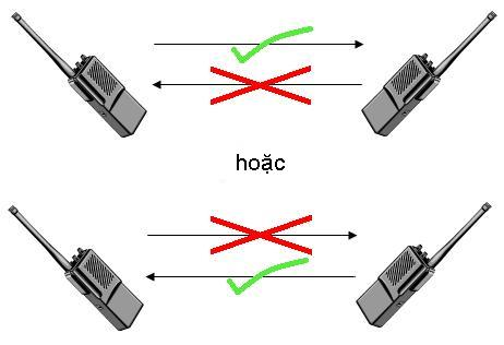 Việt hóa từ hình tự do tại